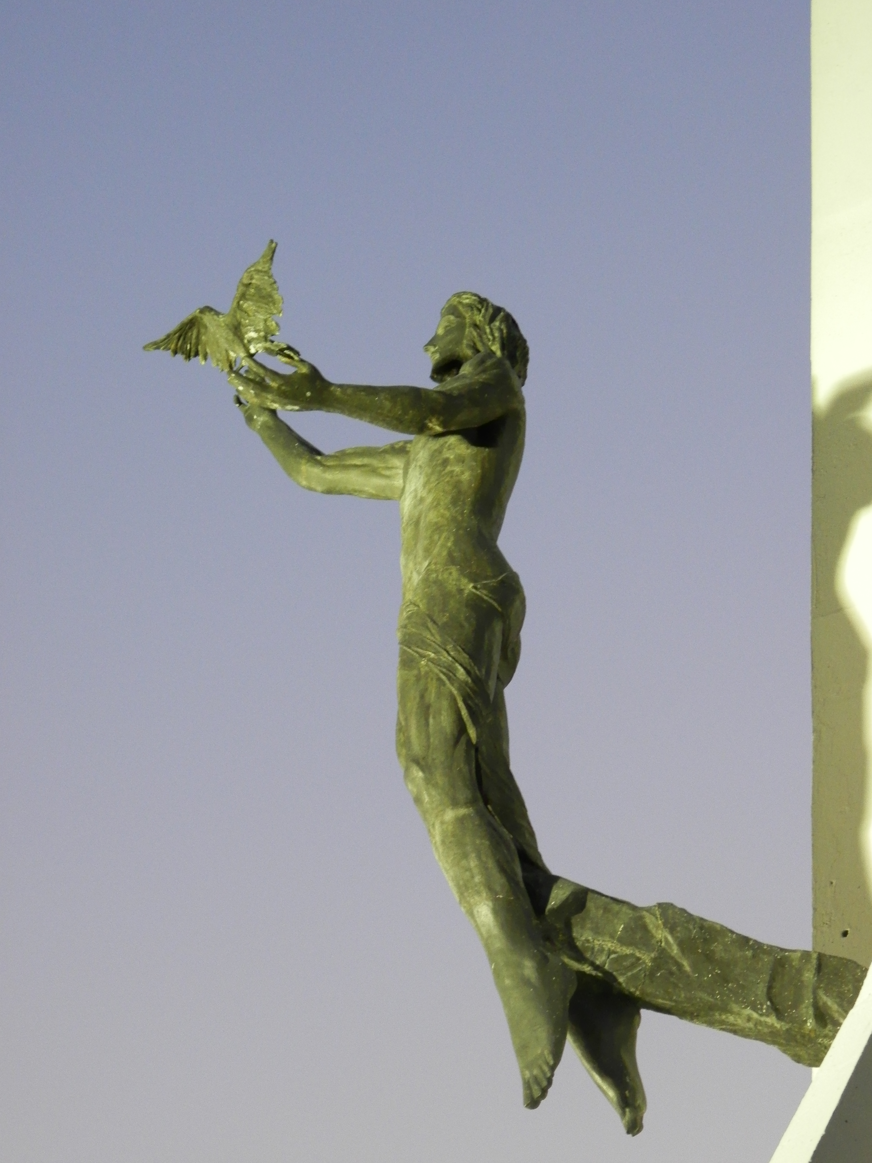 Monumento Cristo de La Paz